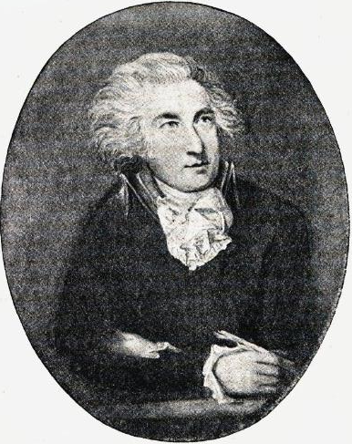 Bernt Anker.